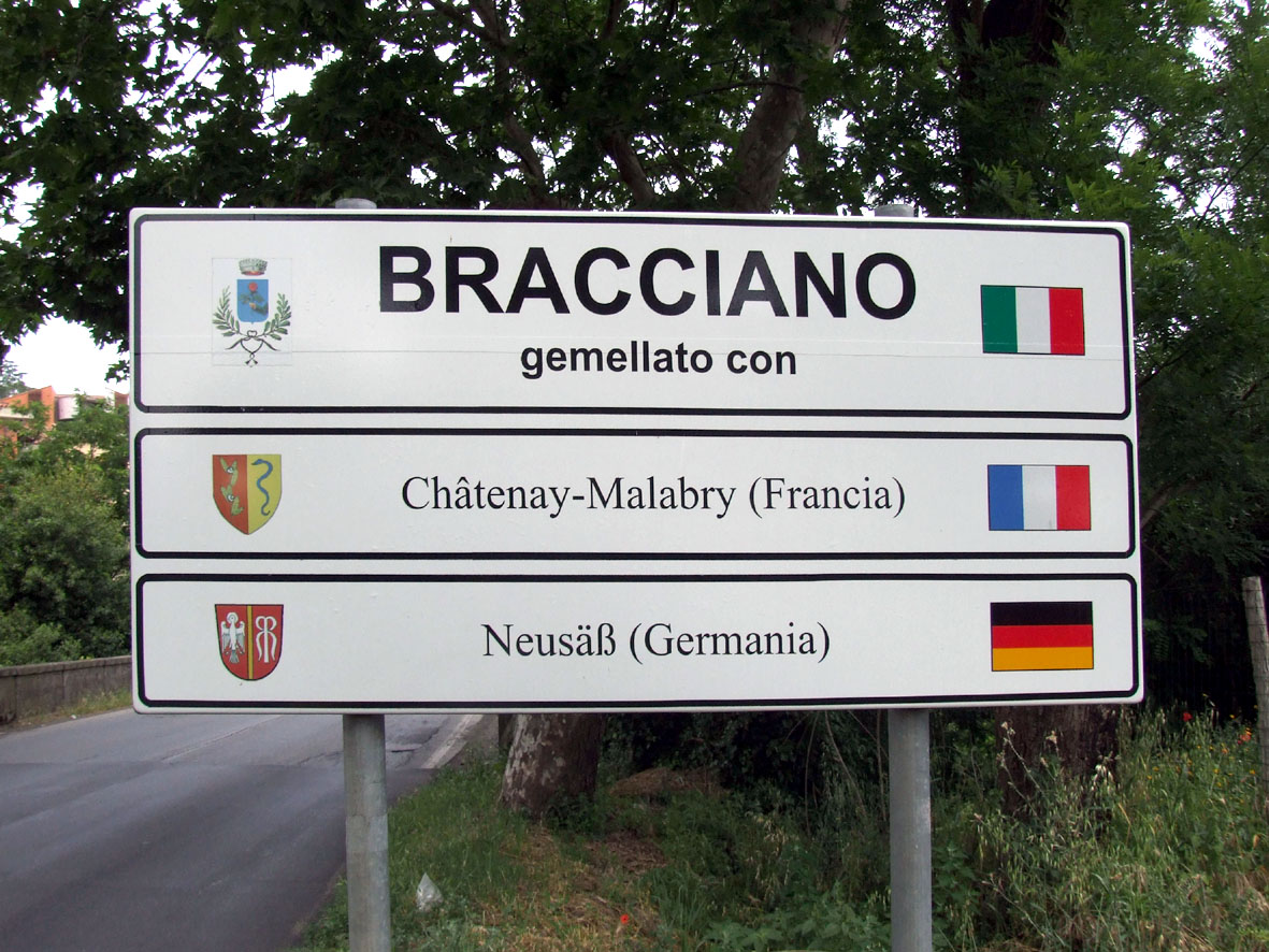 Segnale di Bracciano, Lazio, Italia